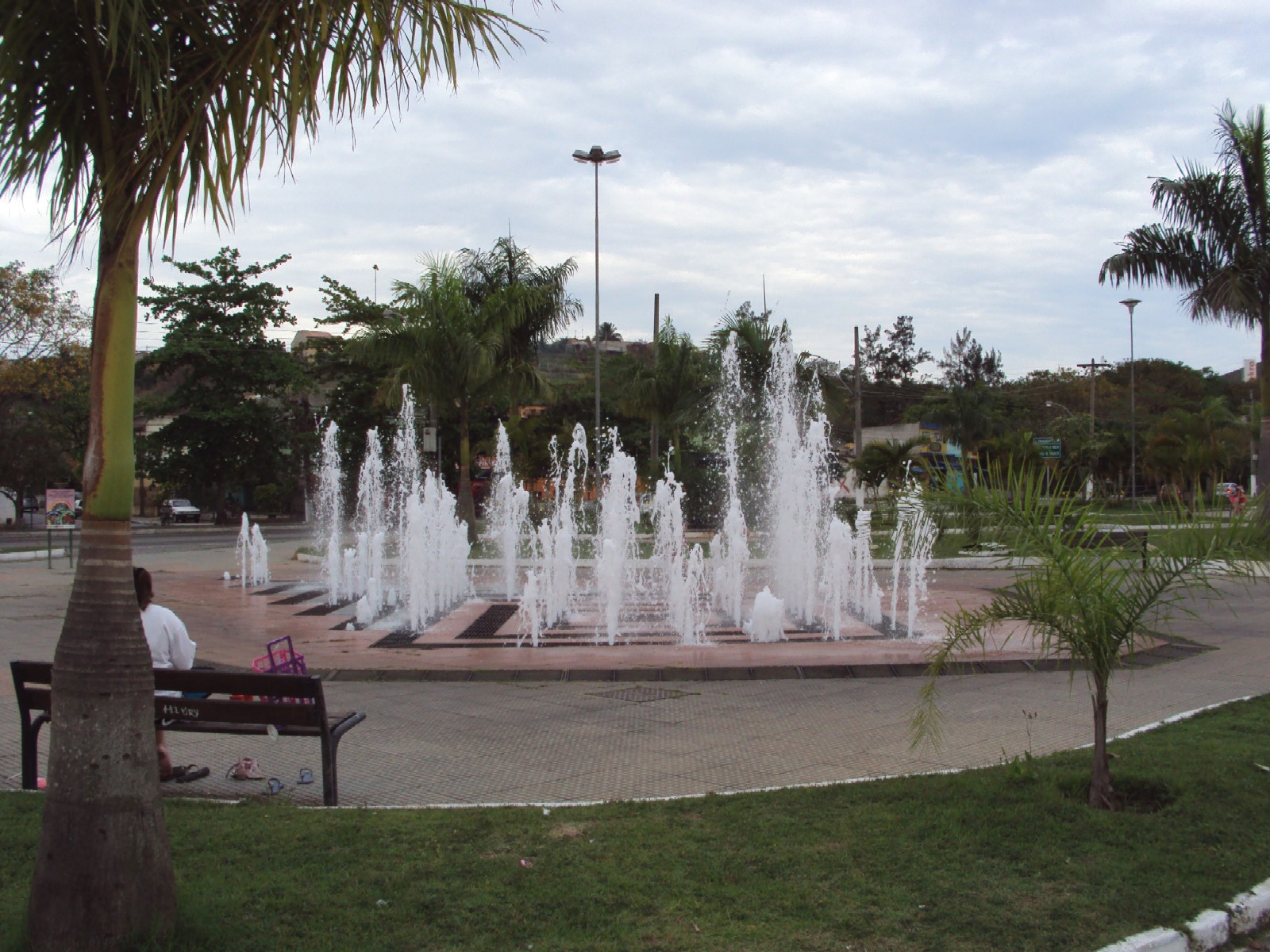 A Praça Oscar Cardoso é a maior do município de Volta Redonda (RJ). Com 23 mil metros quadrados, possui um chafariz interativo bastante frequentado pela população durante os dias de calor. Bem no meio da praça 126 bicos de 2 polegadas de diâmetro lançam jatos variados de água de 5 metros de altura. Há ainda uma pista de 550 metros para cooper, um anfiteatro, raias para jogos de bolas de gude, playground, mesas de damas e xadrez e um amplo estacionamento